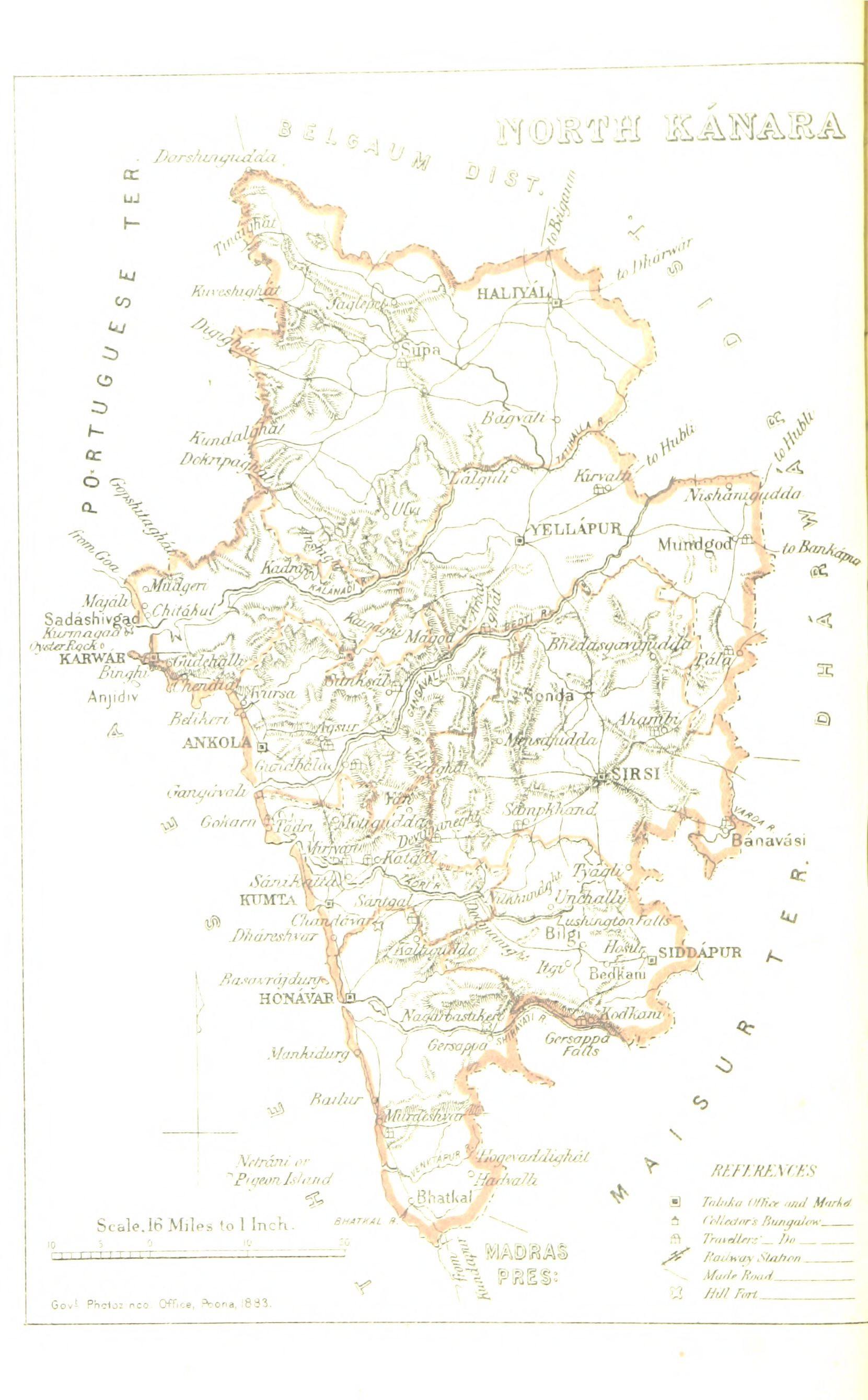 Uttara Kannada (North Kanara), India in 1896